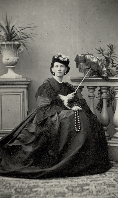 Муромцева Екатерина Николаевна, урожденная кн. Голицына (1830—1901), жена Леонида Матвеевича Муромцева